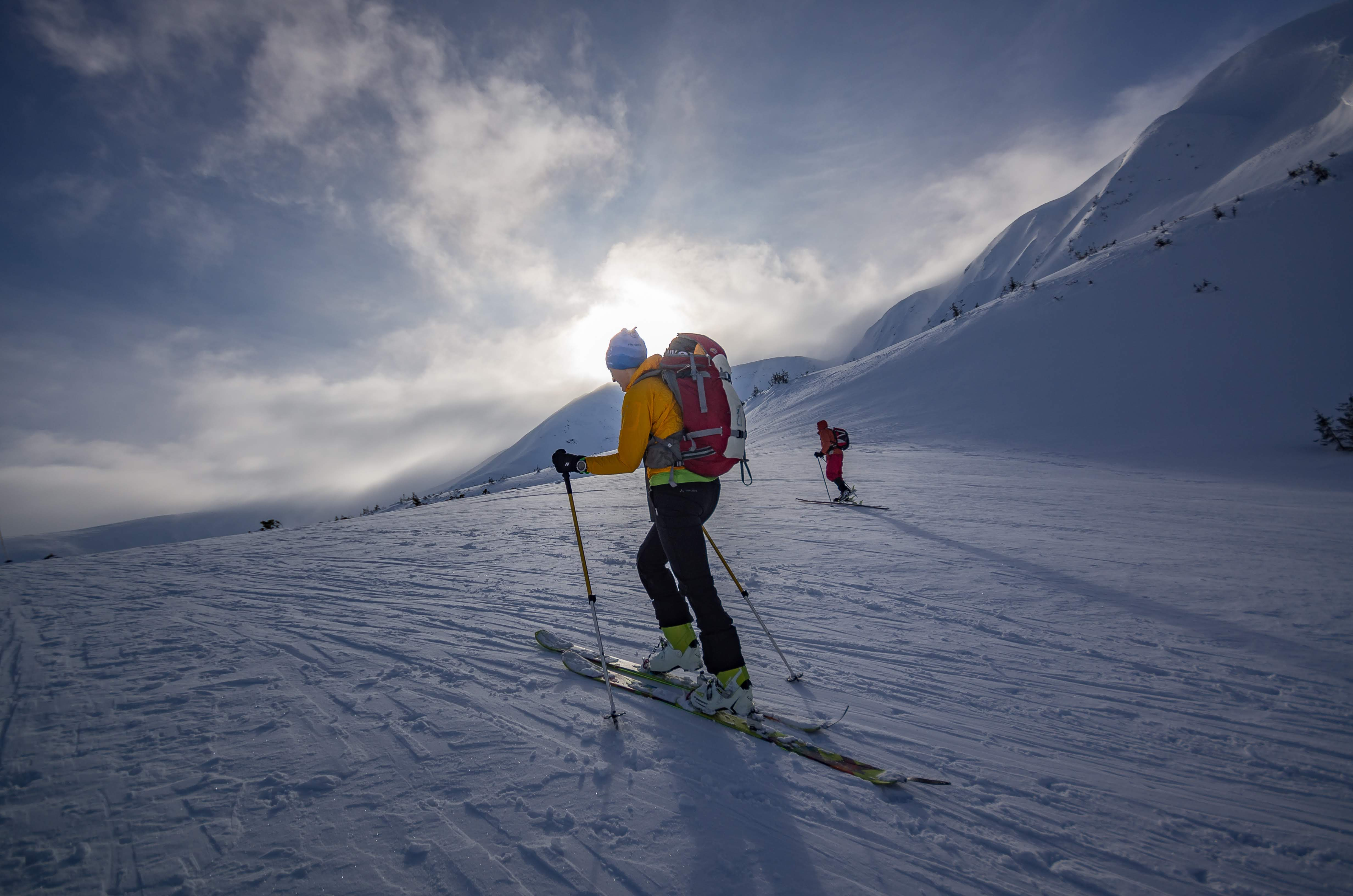 Перша частина Кубку Білого Слона 2018. Підйом